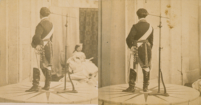 Deux photos pour réaliser une photosculpture, sans doute ici le roi d'Espagne.